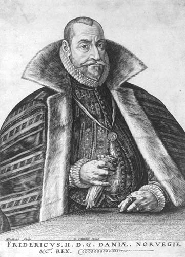 Buste van Frederik II, in bontmantel ten halven lijve weergegeven, achter een tafel.